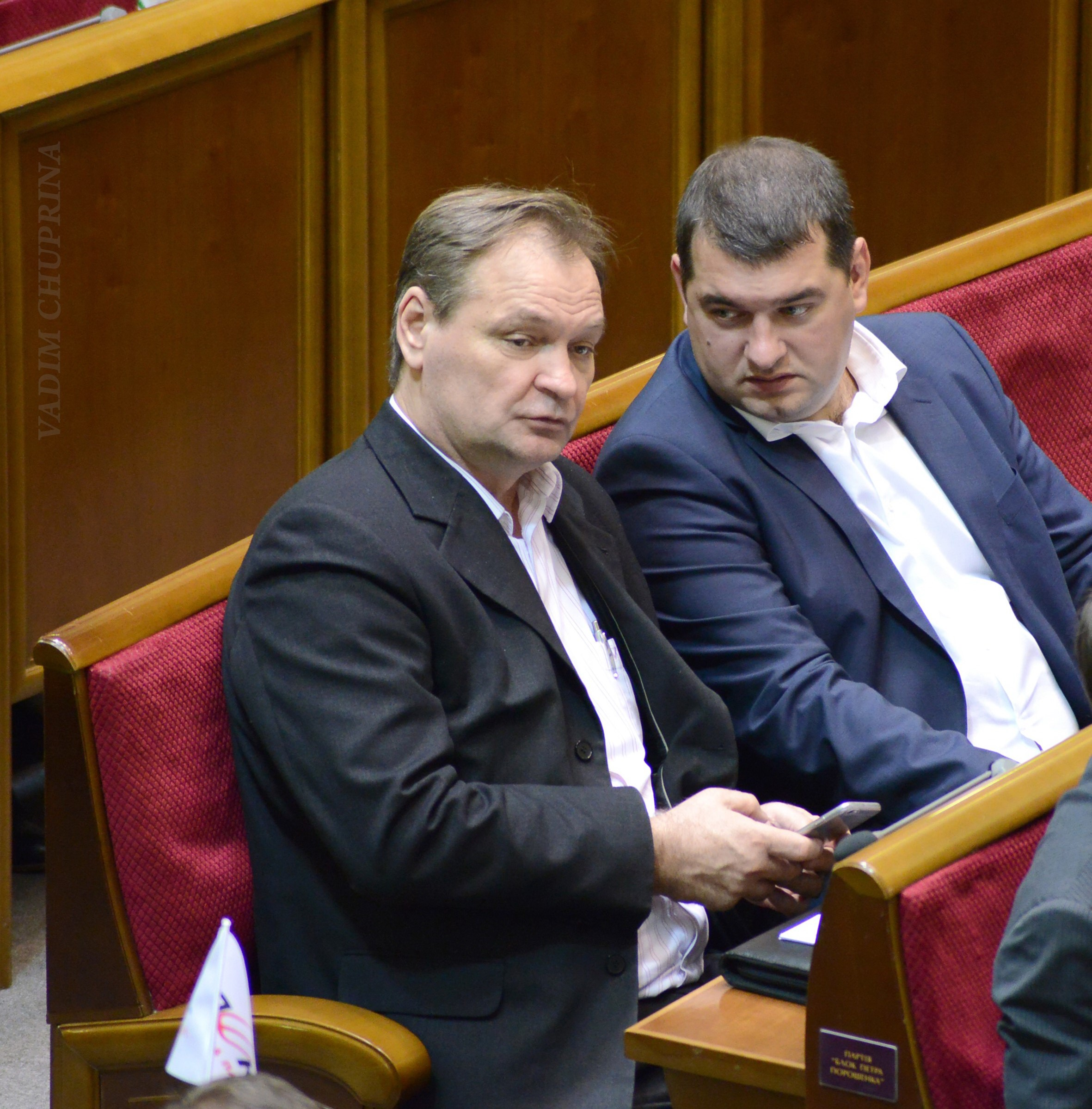 ВЕРХОВНАЯ РАДА УКРАИНЫ 2015 , фото Вадим Чуприна